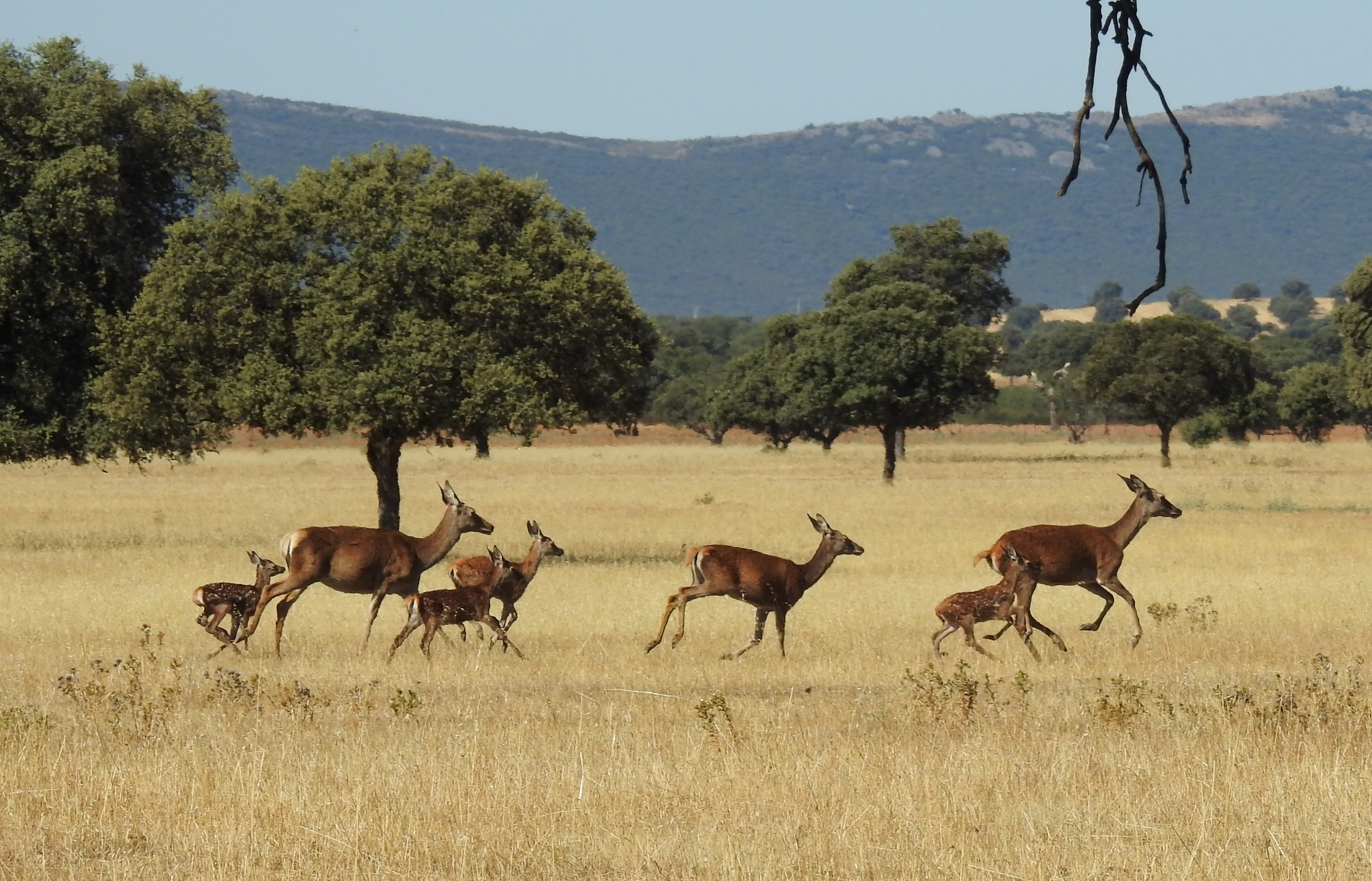 De las casi 41.000 hectáreas del Parque Nacional, en su mayoría bosque mediterráneo, unas 8.000 hectáreas están conformadas por una gran llanura salpicada de encinas, la Raña, donde grandes herbívoros como los ciervos encuentran alimento.